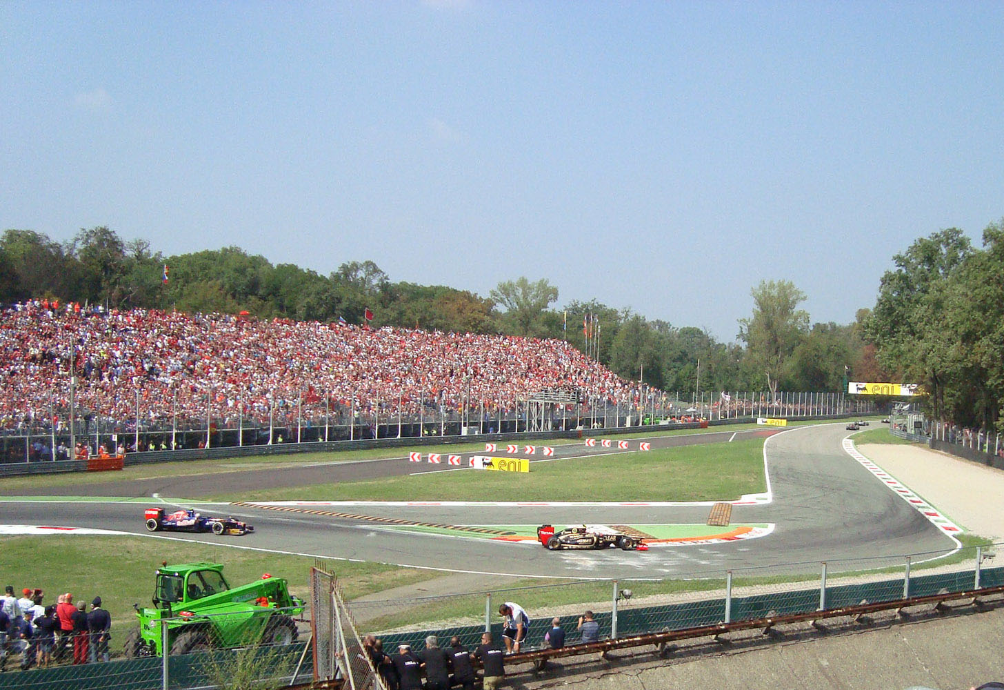 F1 GP Italien in Monza 2012, 1. Schikane